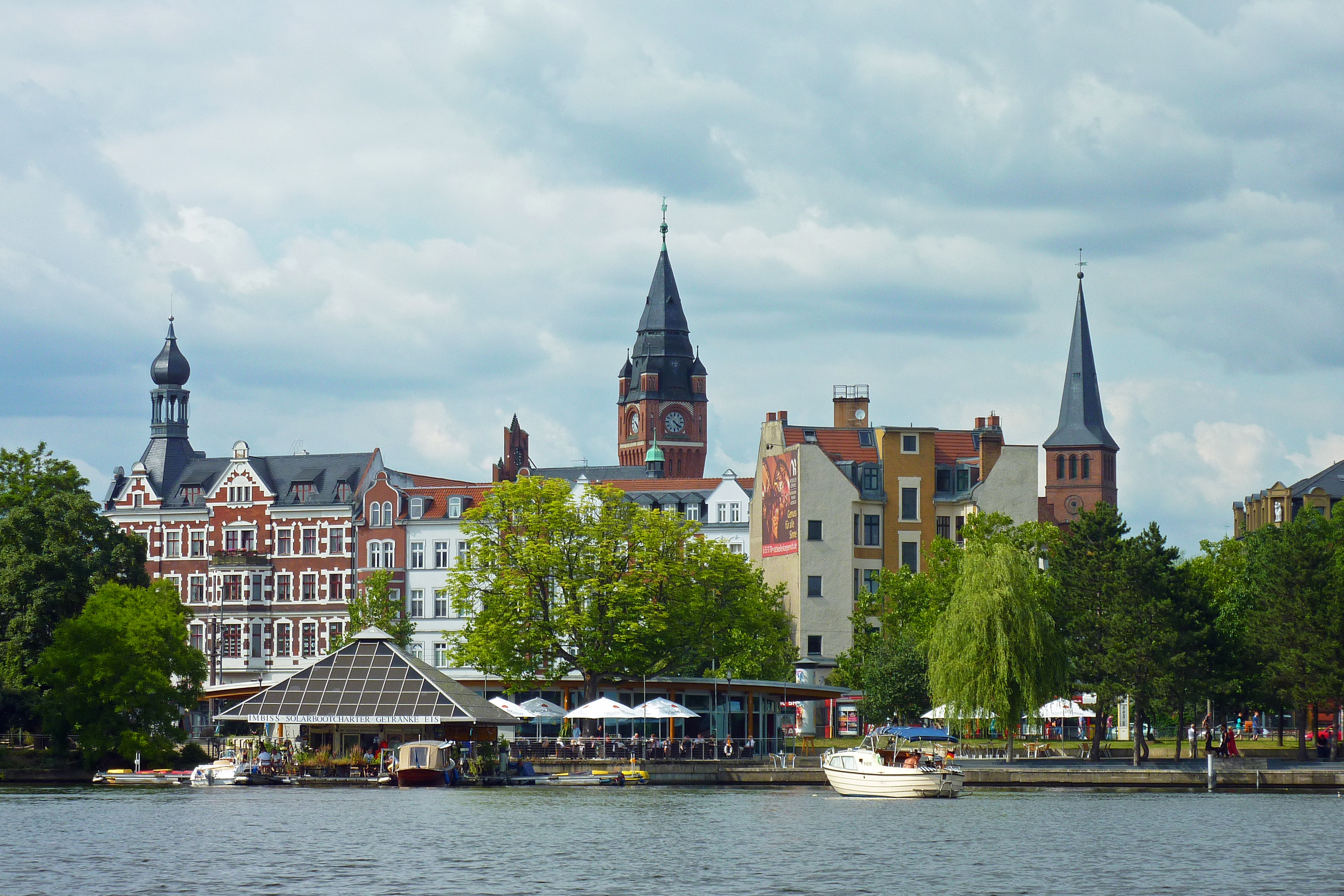 Blick vom Frauentog zur Altstadtinsel in Berlin-Köpenick.